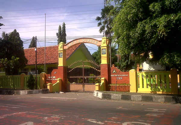 SMPN 1 Sumber, Jalan Dewi Sartika, Kecamatan Sumber, Kabupaten Cirebon, Provinsi Jawa Barat, Indonesia.